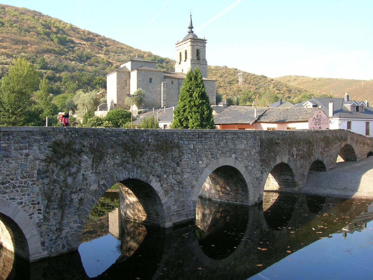 Puente románico sobre el río Meruelo.